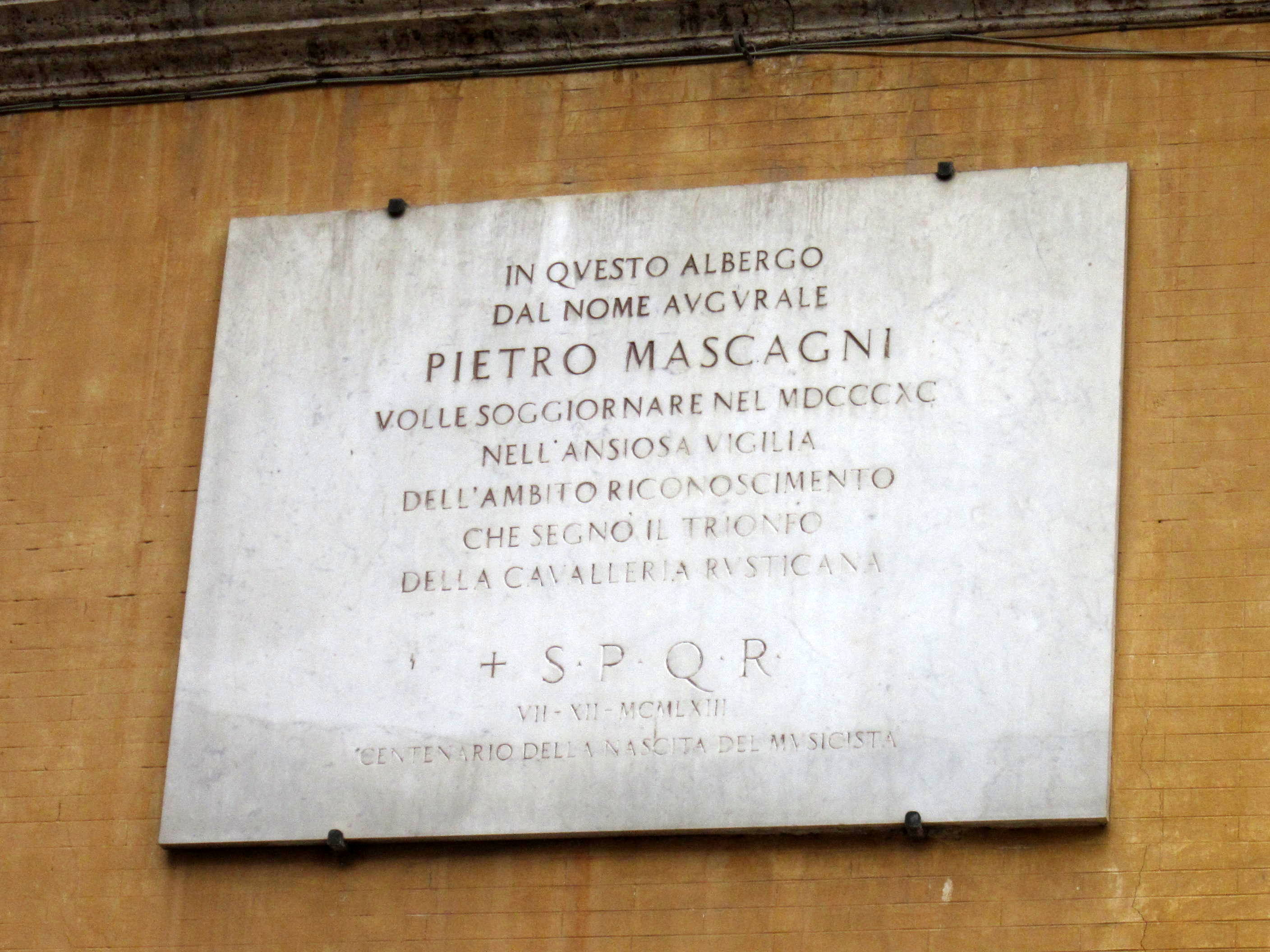 Roma, Albergo del Sole a piazza della Rotonda: Lapide dedicata al compositore livornese Pietro Mascagni